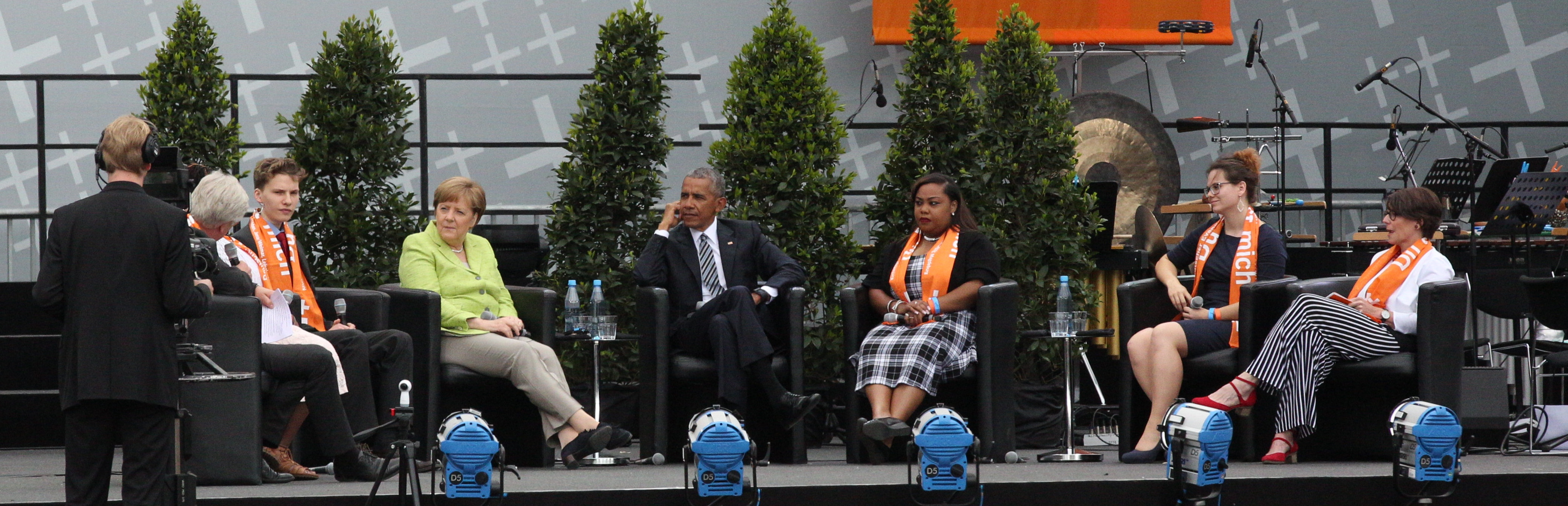 Angela Merkel und Barack Obama während einer Gesprächsrunde am Brandenburger Tor anlässlich des Deutschen Evangelischen Kirchentags 2017 in Berlin und Wittenberg. Auf dem Podium sitzen am 25. Mai 2017 neben dem EKD-Ratsvorsitzenden Heinrich Bedford-Strohm (links) und der Kirchentagspräsidentin Christina Aus der Au weiterhin vier Jugendliche aus Chicago und Deutschland, die Fragen stellen durften.